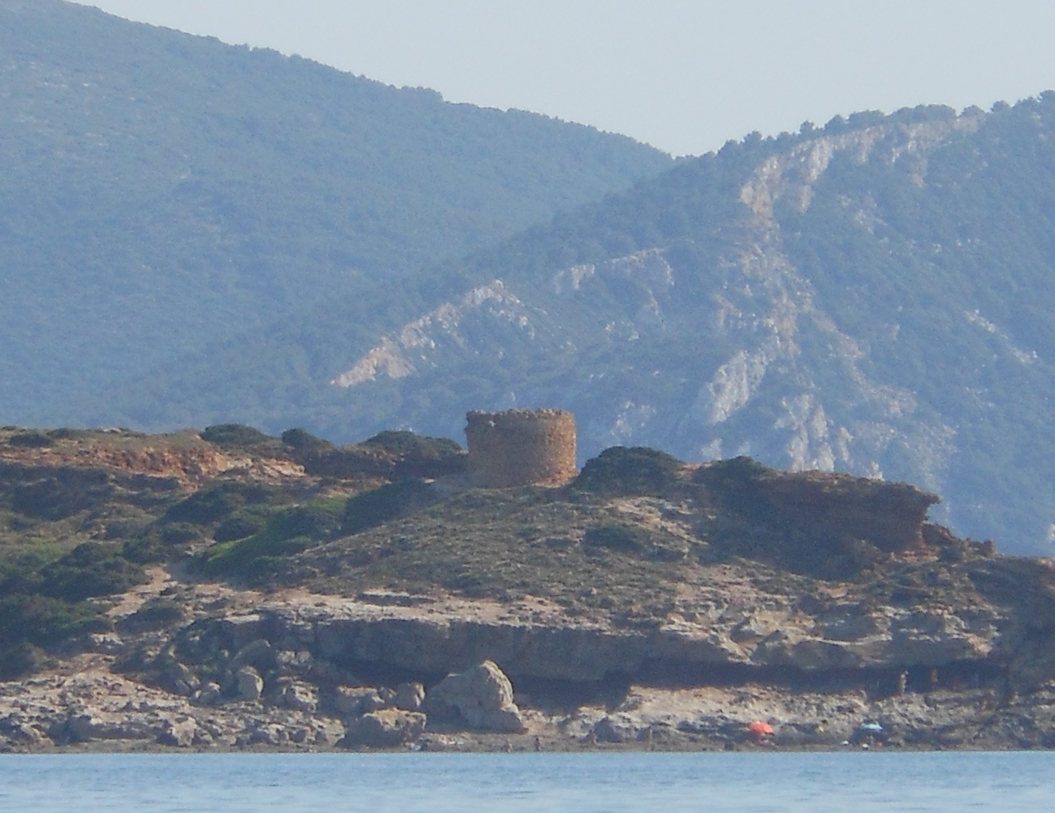 Torre di Bantine Sale